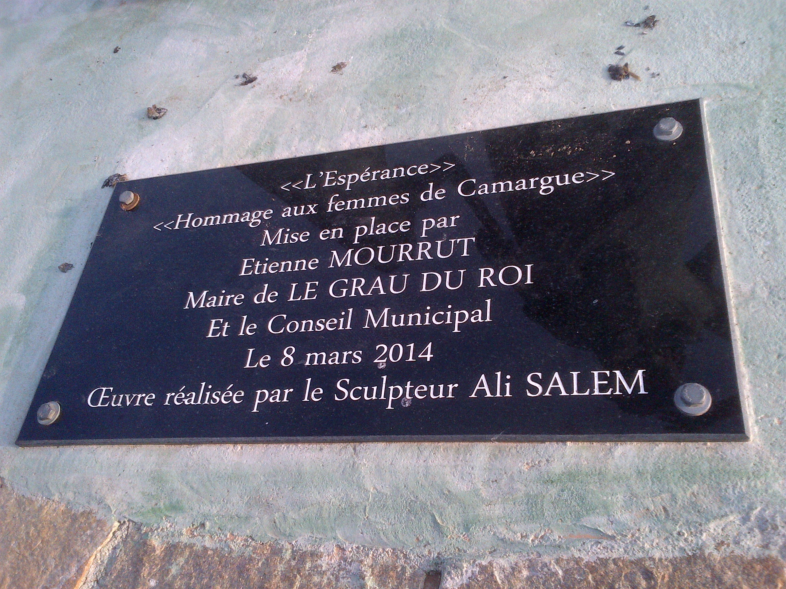 Plaque descriptive de L'Espérance, sculpture d'Ali Salem installée sur le littoral du Grau-du-Roi, sur la rive gauche.